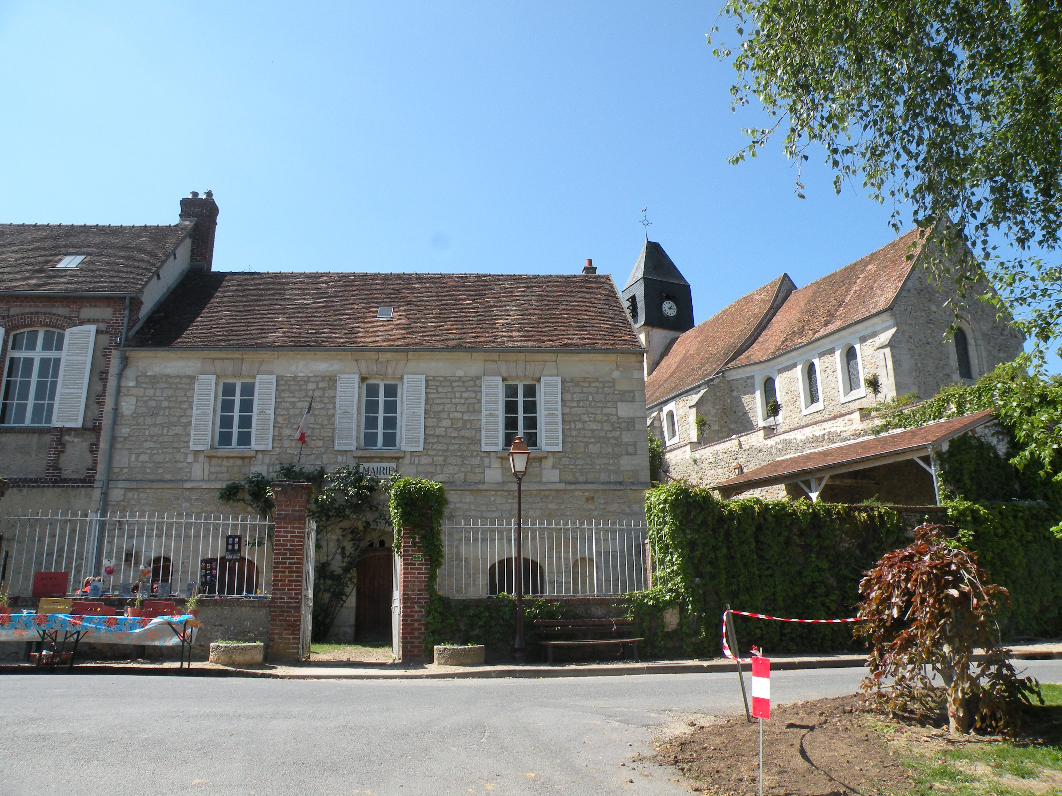 mairie